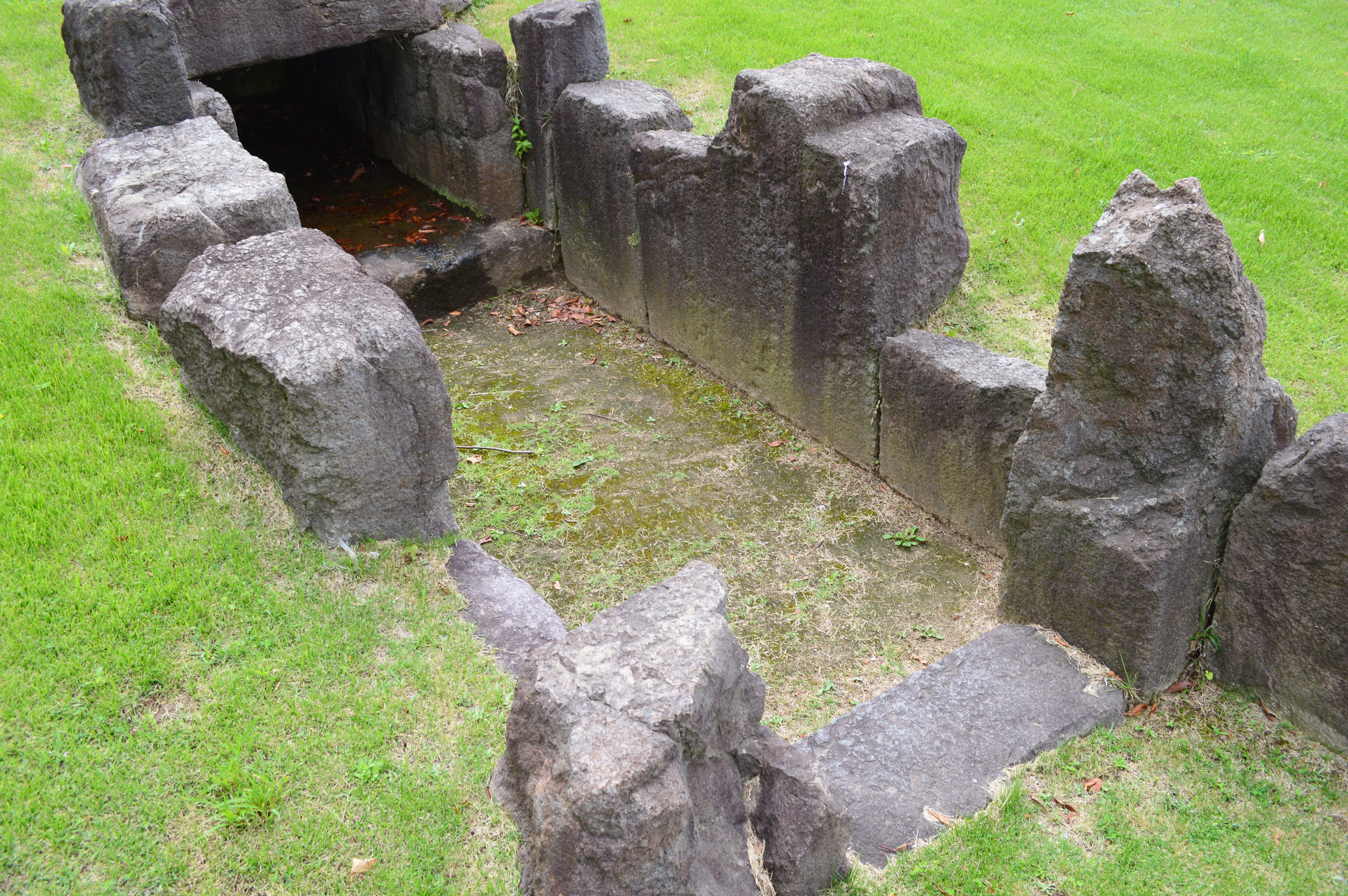 鉢伏山西峰古墳 石槨前室